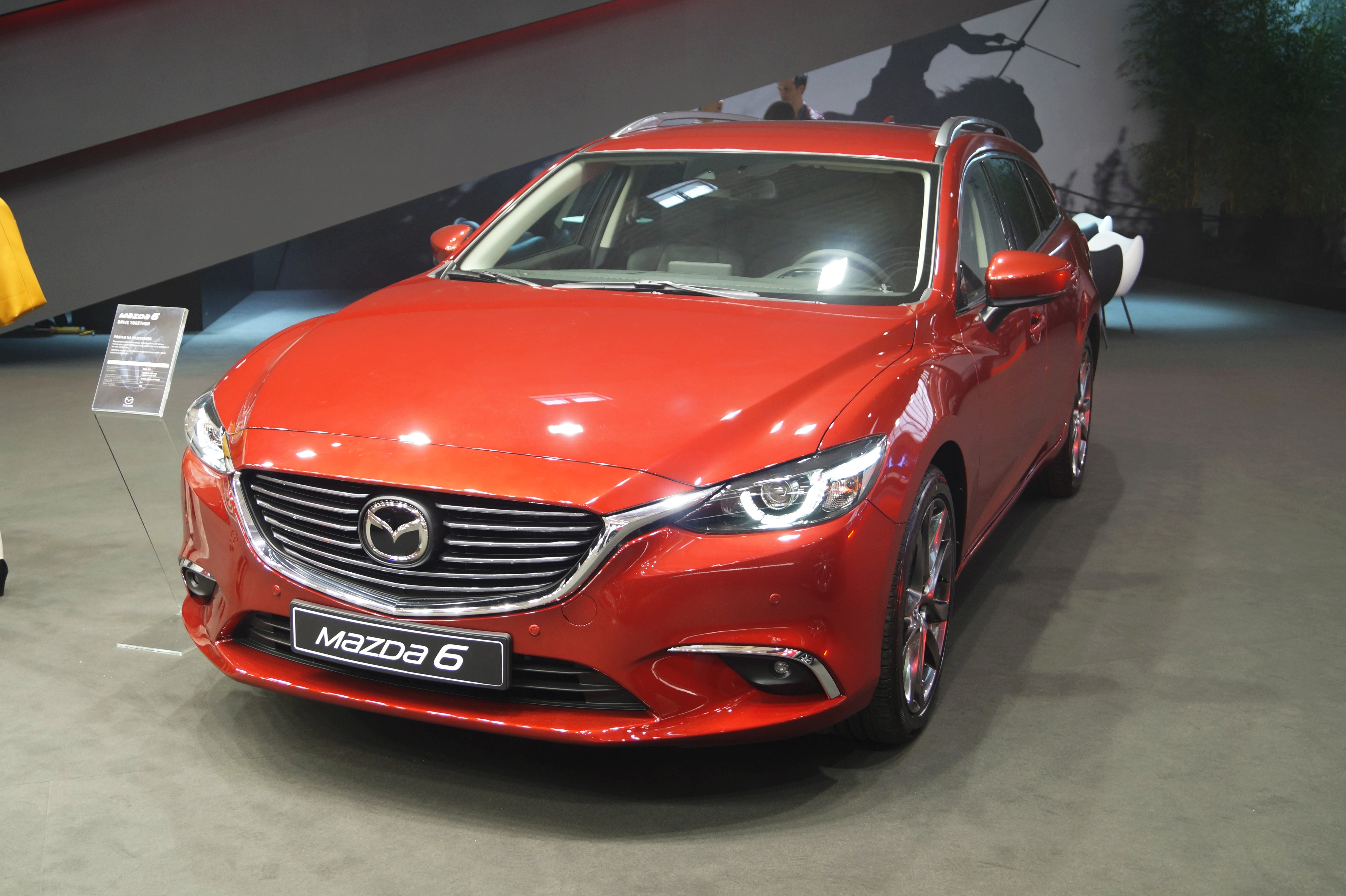 Przód Mazdy6 na Motor Show Poznań 2017.